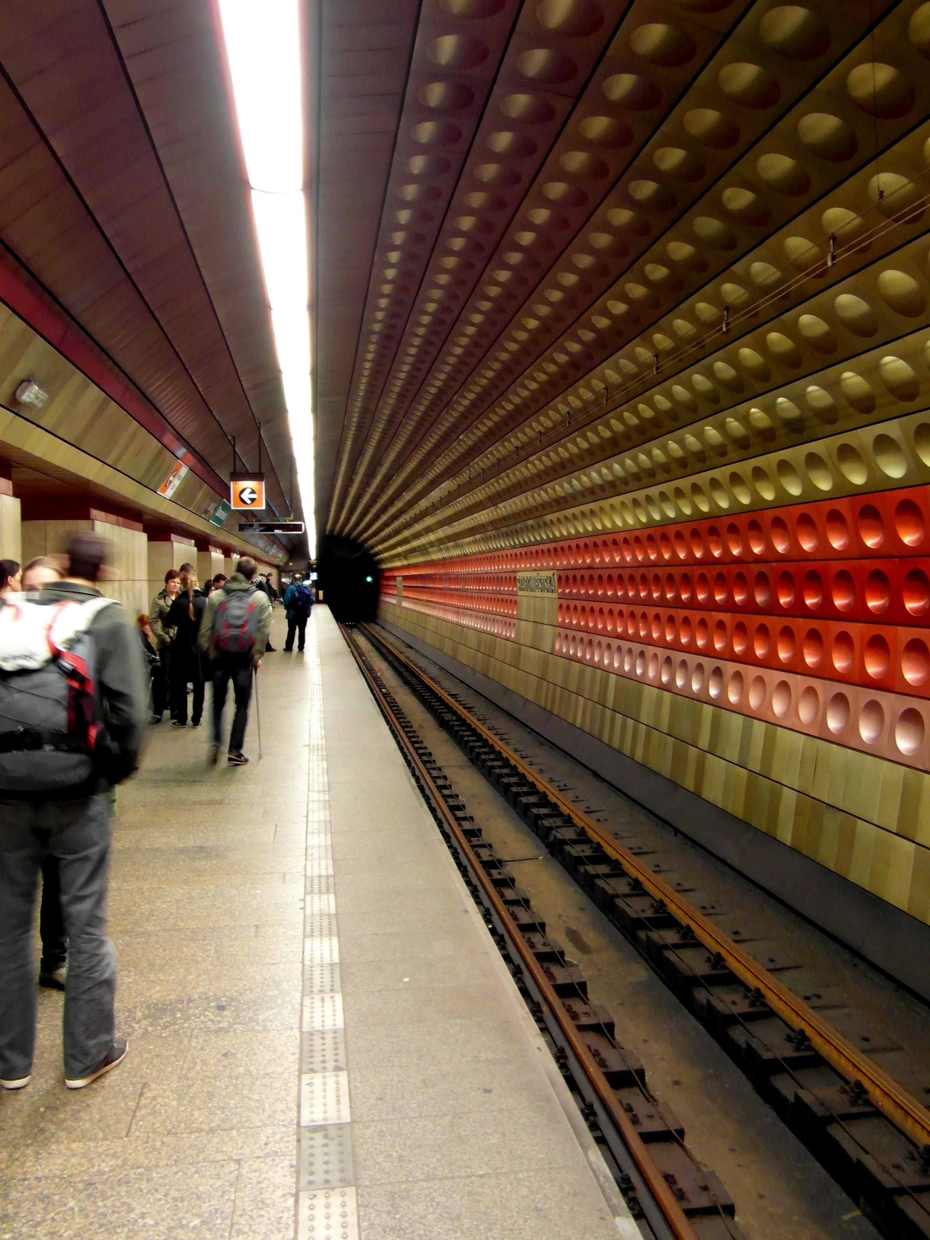 Praha - Metro - Staroměstská